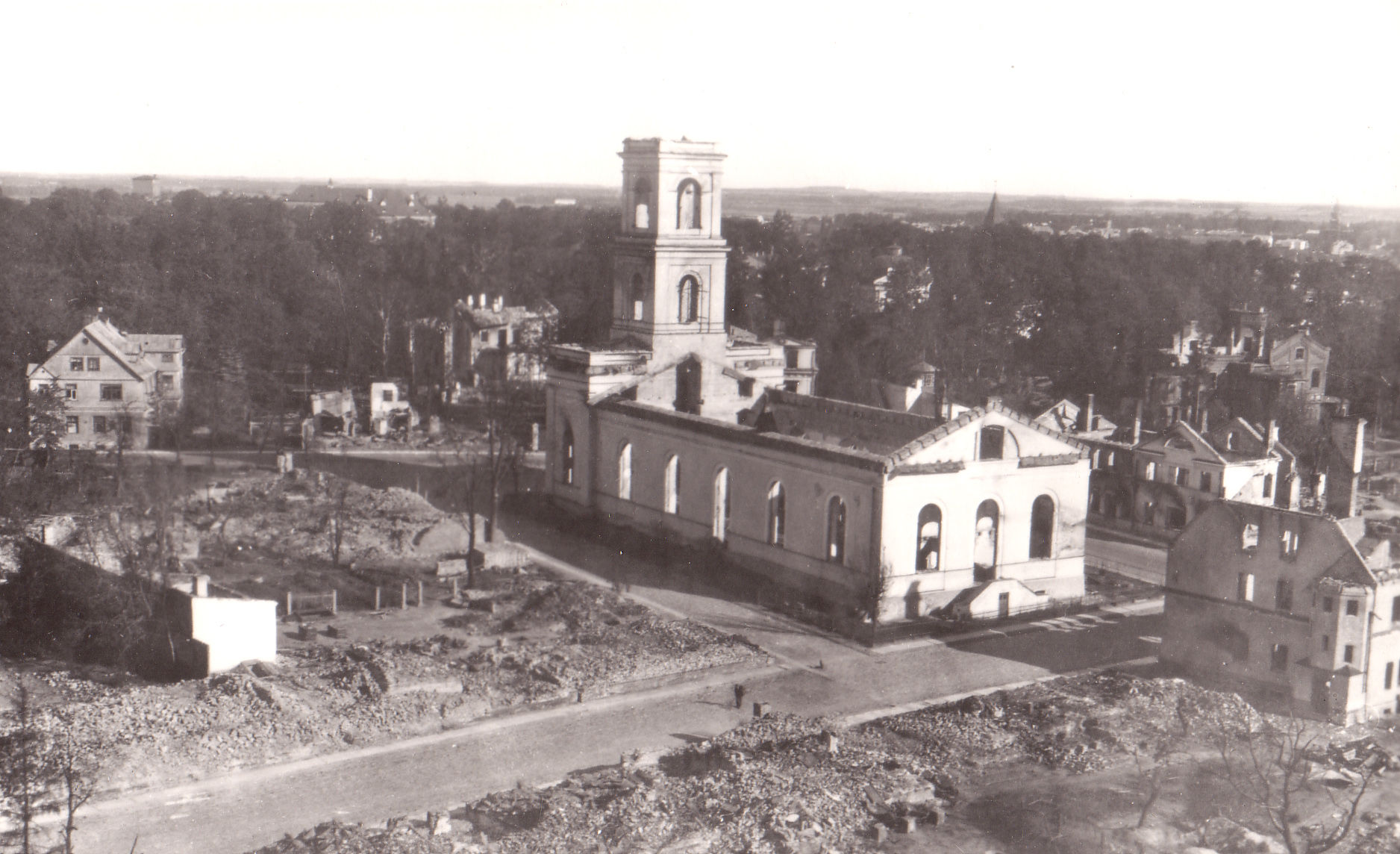 Tartu Maarja kirik 1941.a. -tulevase Eesti Põllumajanduse Akadeemia (EPA) võimla asukoht ( eesti)